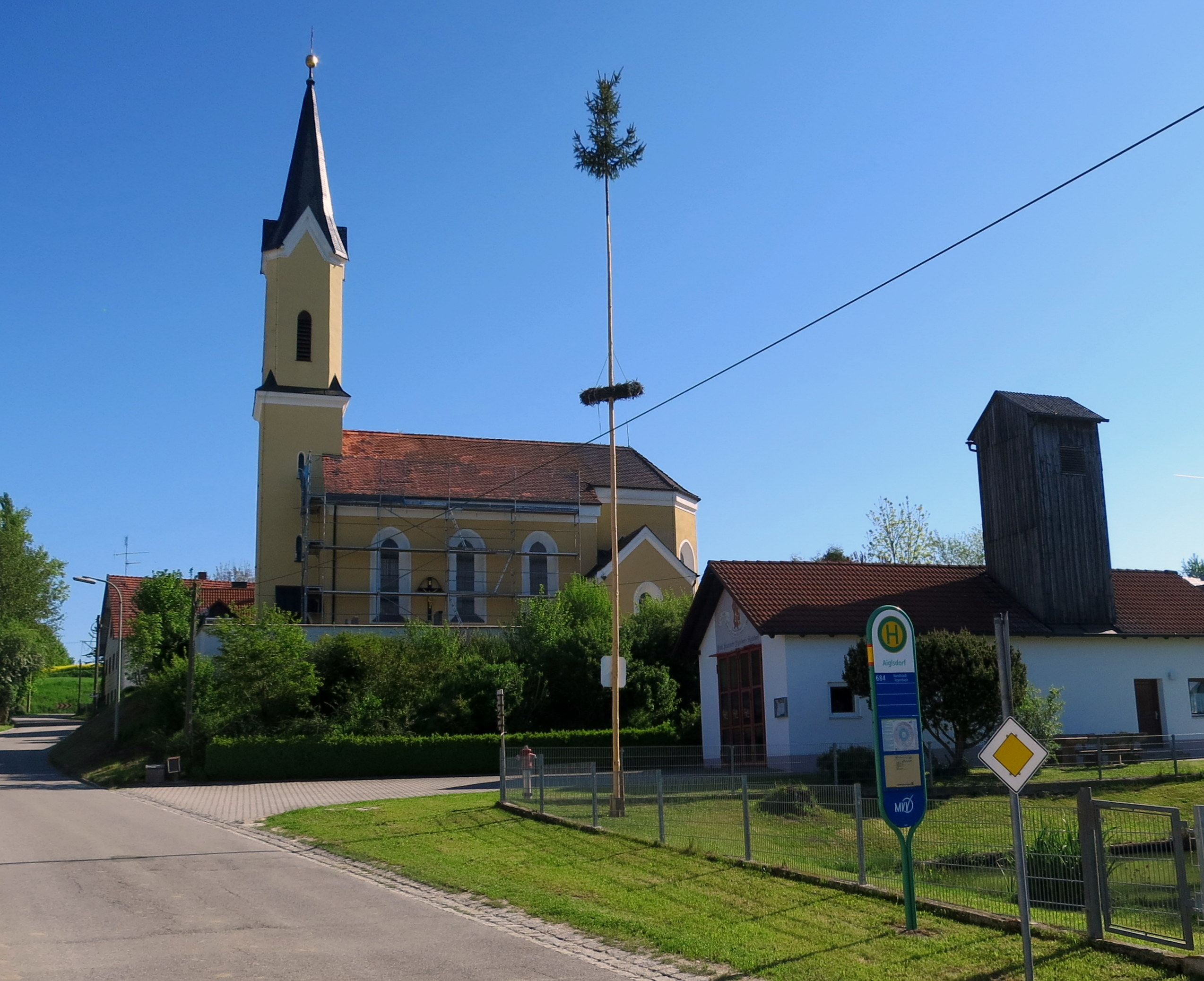 Eine Filialkirche mit romanisch-gotischem Saalbau